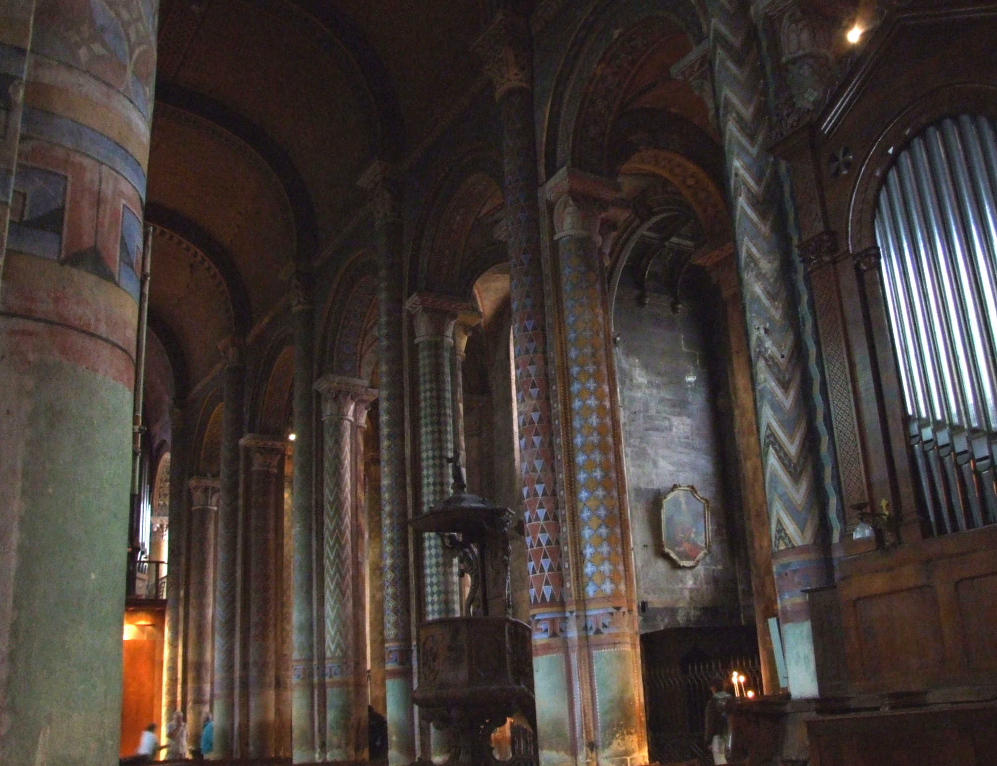 Notre-Dame la Grande de Poitiers, Poitiers, Poitou-Charentes, FRANCE